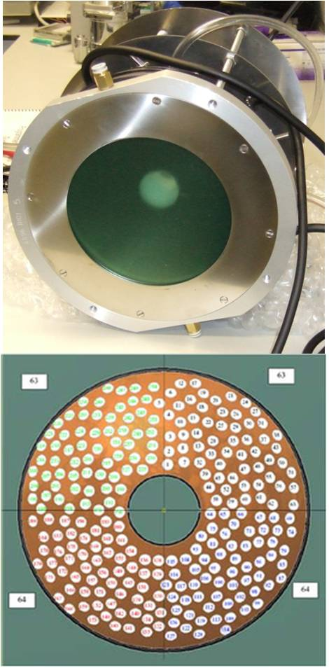 Рандомизированная решетка для применения в хирургии [1] [2][3]. Вверху - внешний вид, внизу - расположение элементов